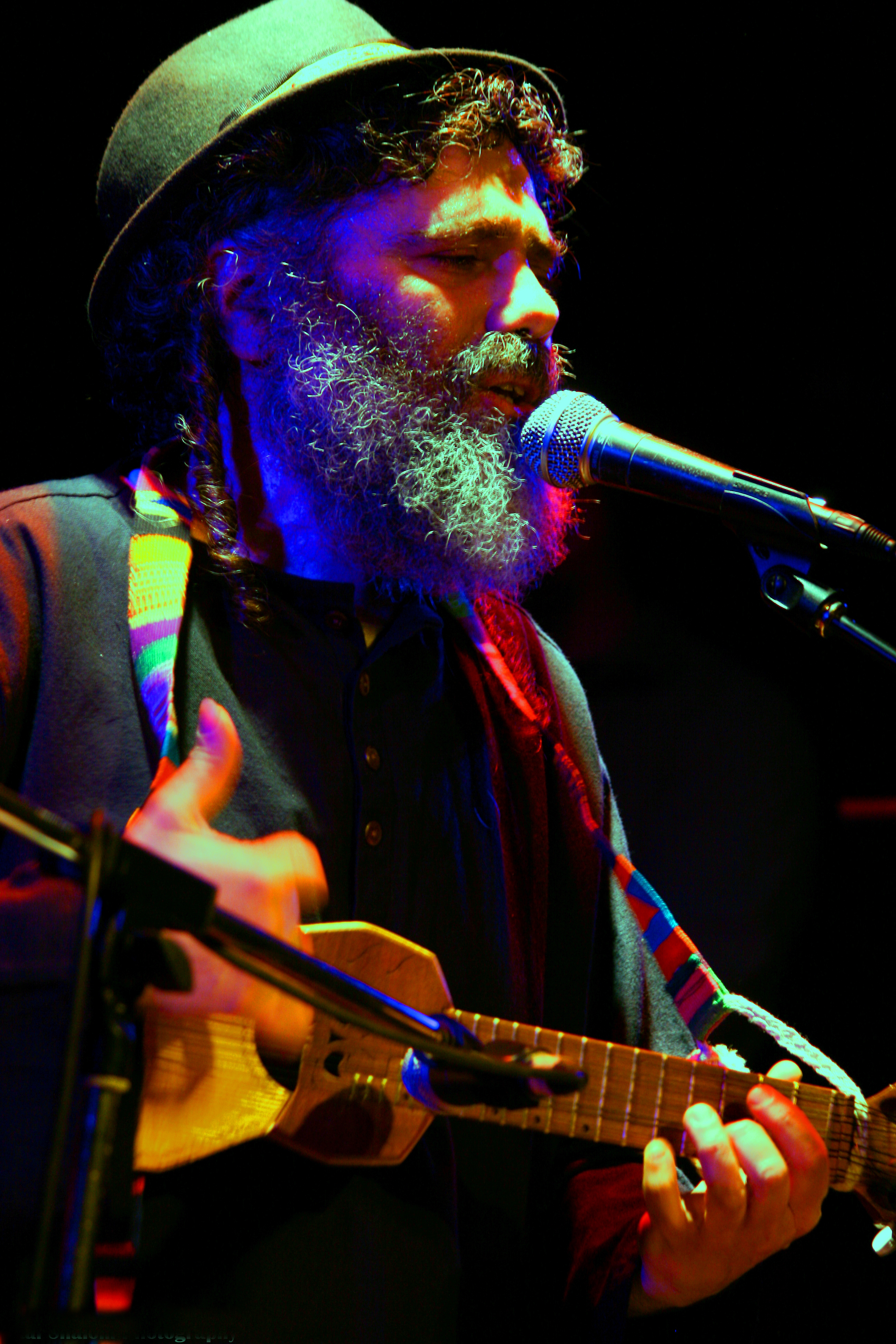 Yyjiujkk